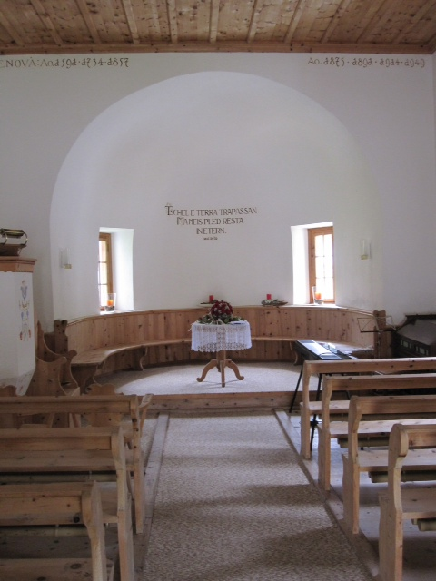 reformierte Kirche in S-charl (bei Scuol im Unterengadin)